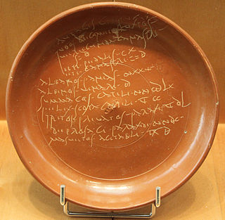 Латинський курсив на посудині, знайденій при розкопках в римській провінції